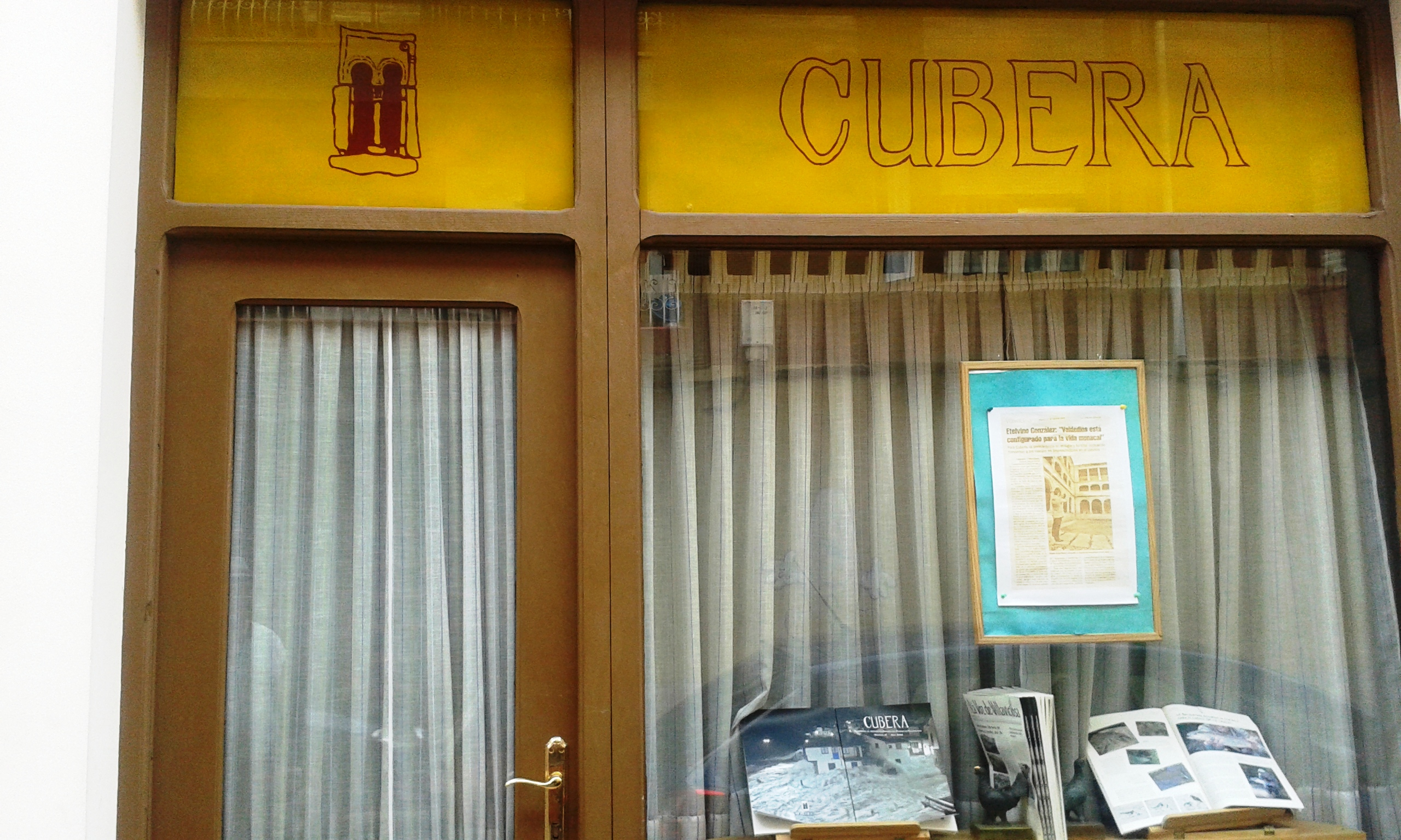 sede de cubera en villaviciosa,asturias.2015